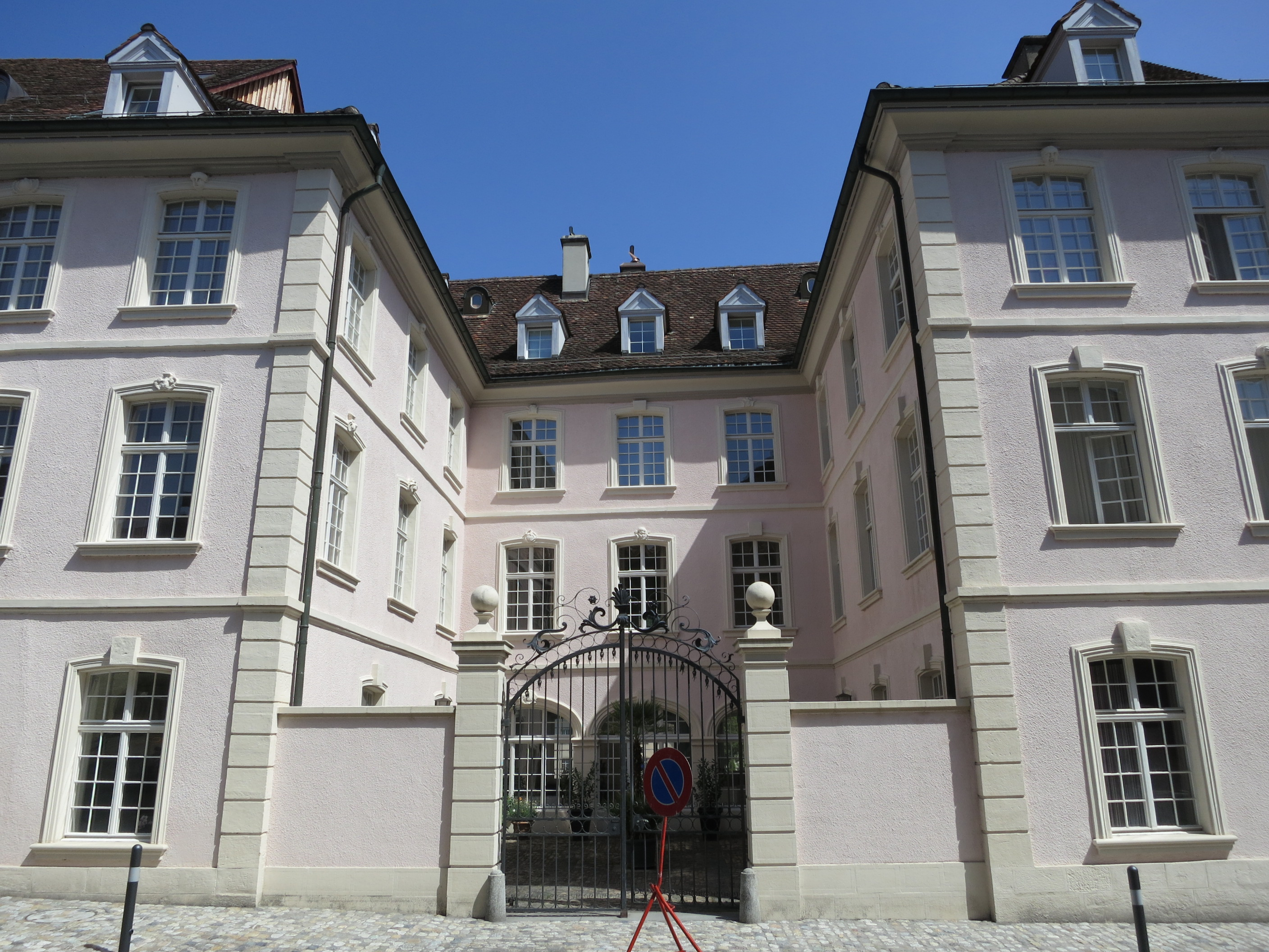 Marschallhaus, Kaiserstuhl AG, Schweiz